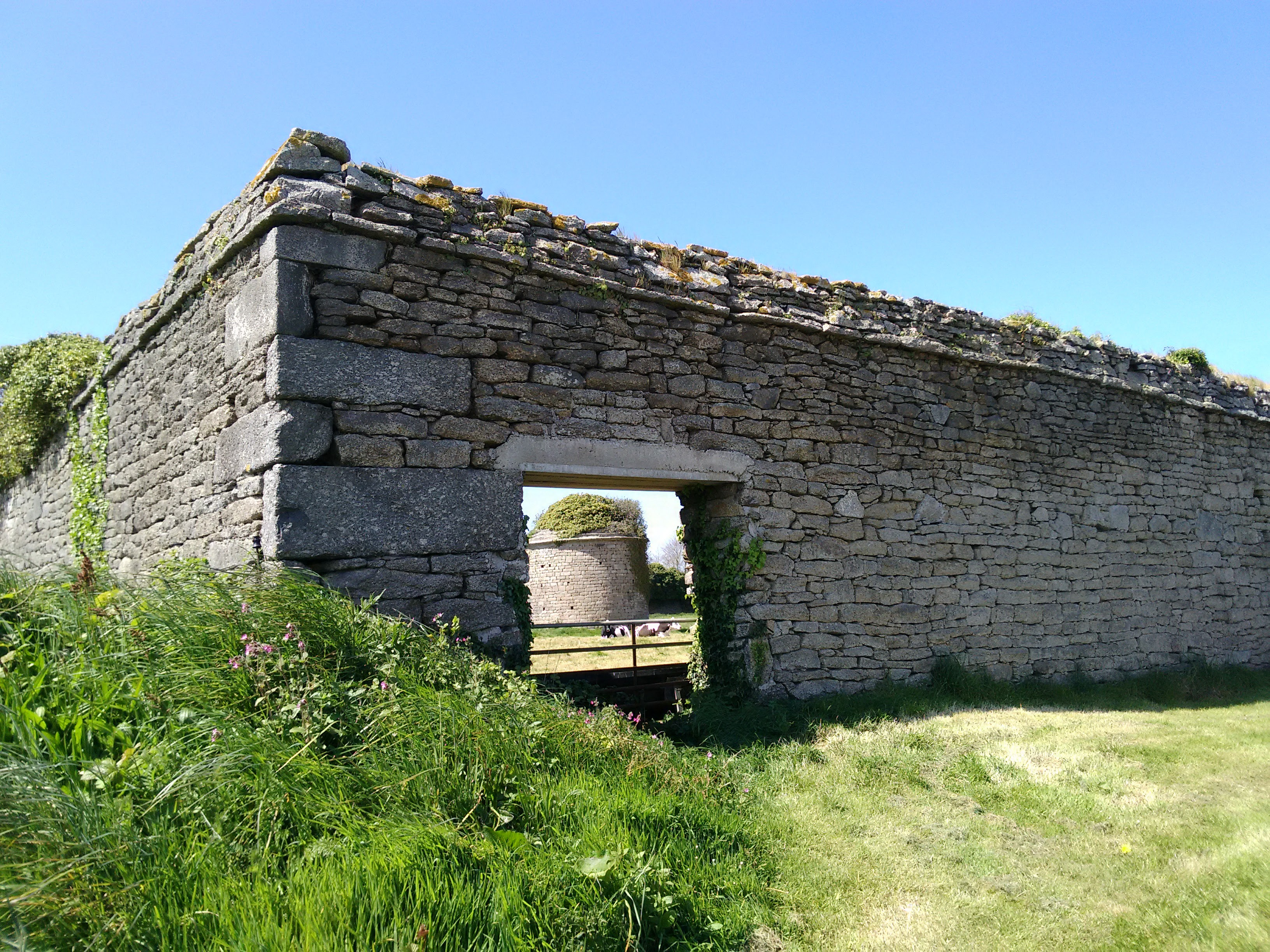 Lampaul-Ploudalmézeau - Rocervo - pigeonnier